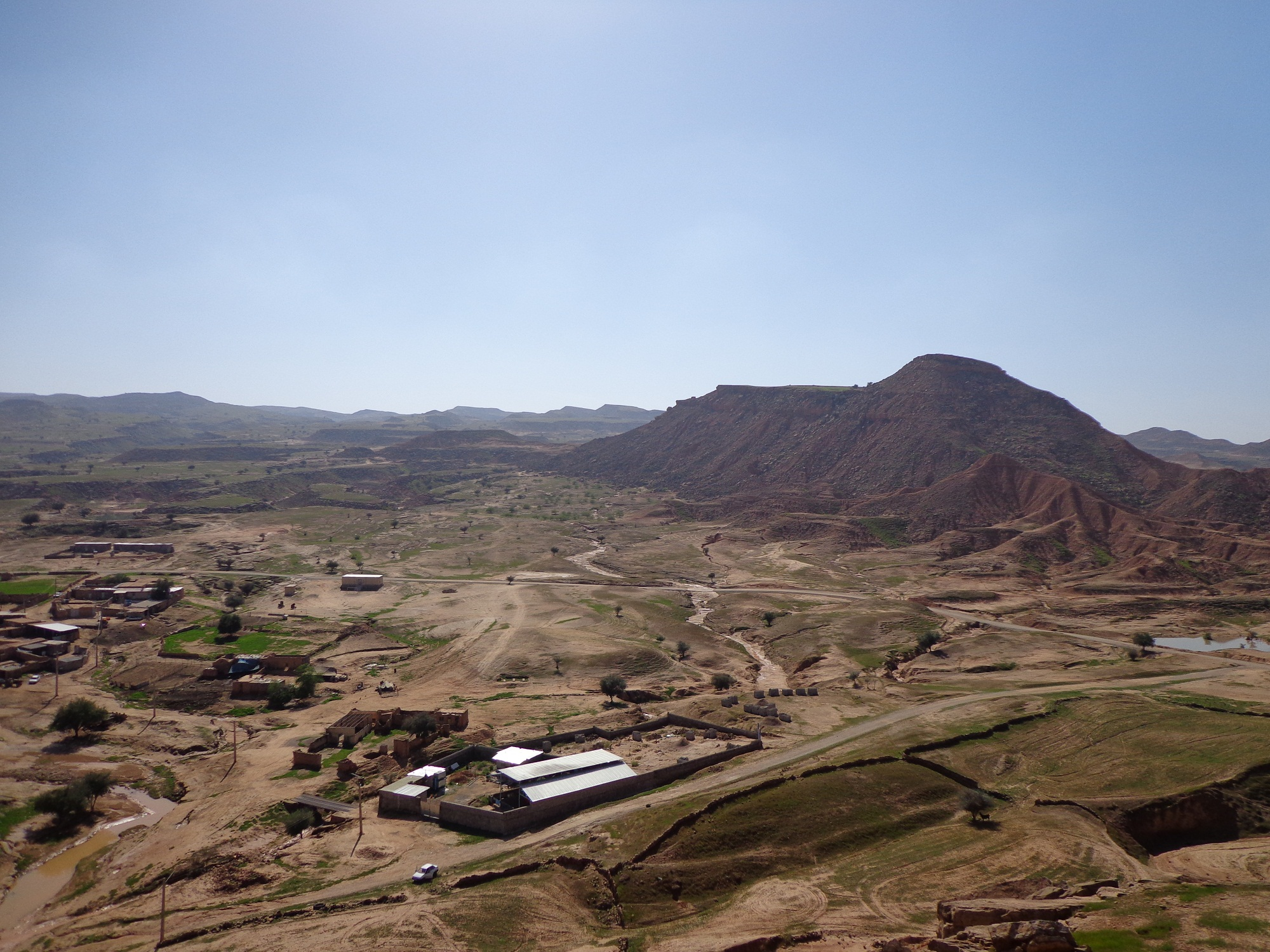 این عکس در نوروز سال 1394 گرفته شده است.